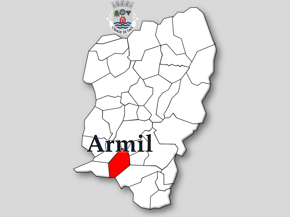 Censos 1864/2011